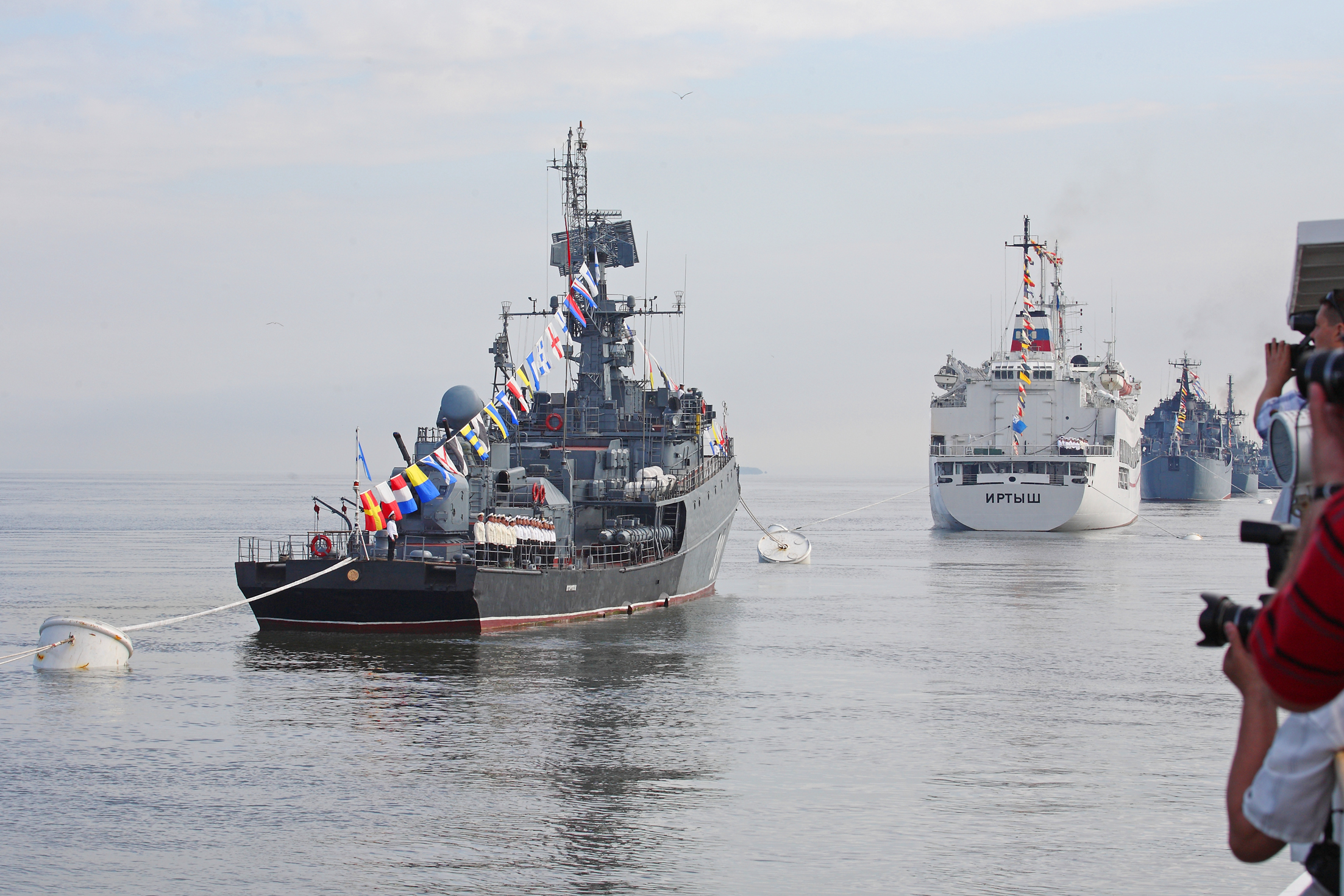 Парад кораблей на день ВМФ 2009 года, Владивосток